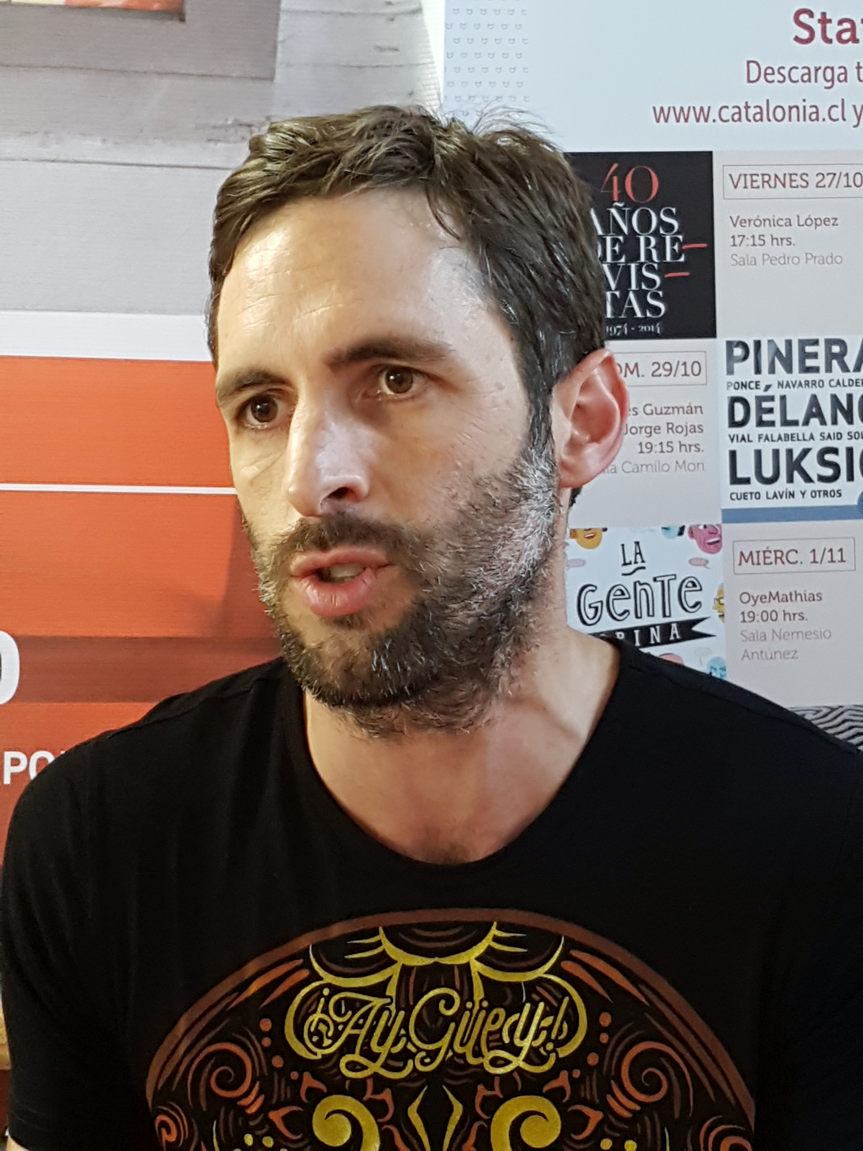 El periodista chileno Daniel Matamala en la Feria Internacional del Libro de Santiago 2017.